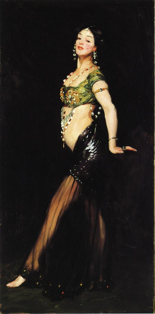 Salome